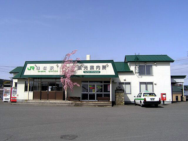 Samani Station in Hidaka Main Line, Japan